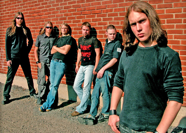 Moonlight Agony band image